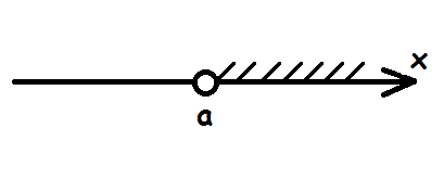 x ir lielāks nekā a